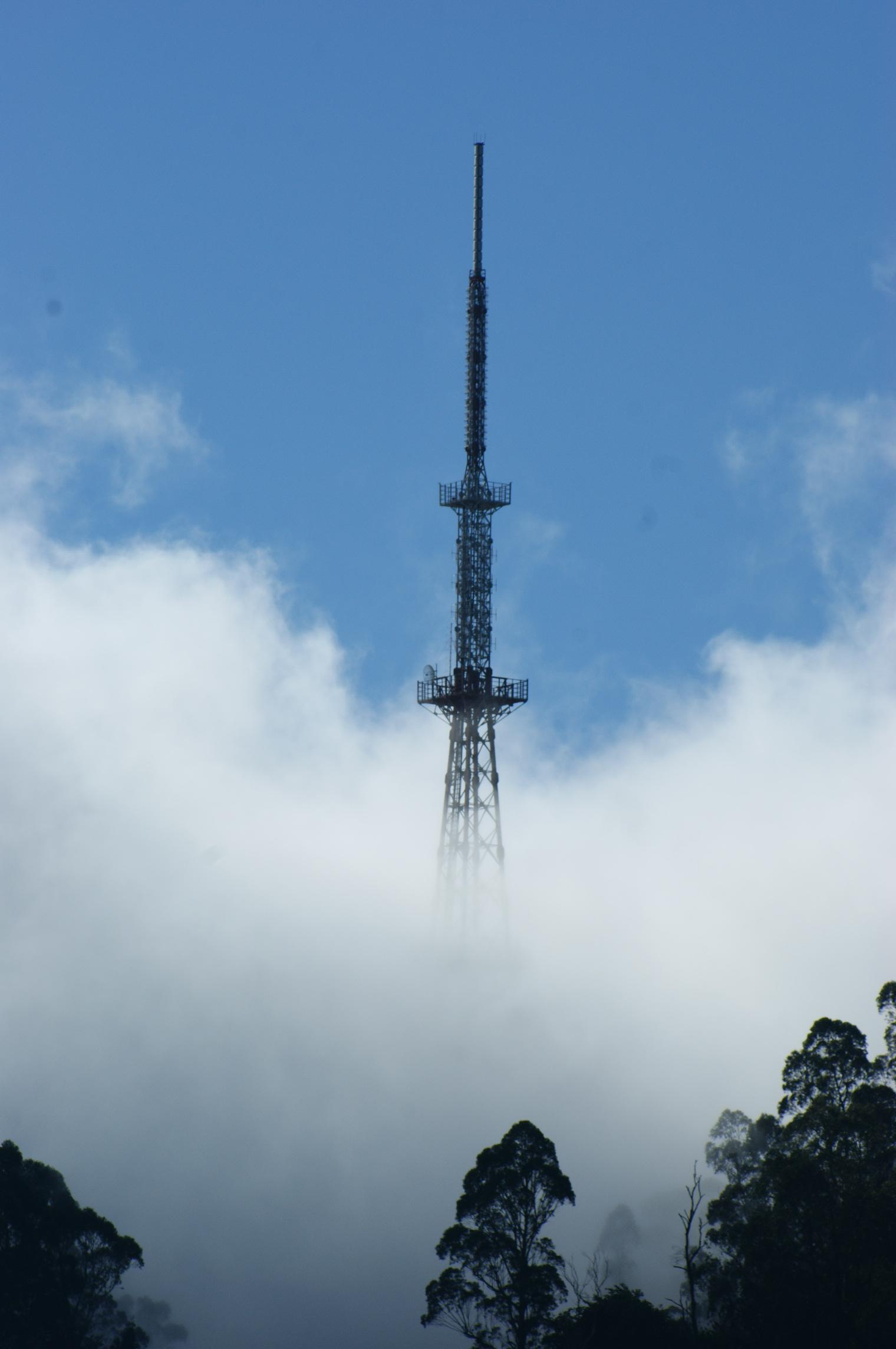 കൊടൈക്കനാലിൽ മഞ്ഞിൽ കുളിച്ചു നിൽക്കുന്ന ഗോപുരം